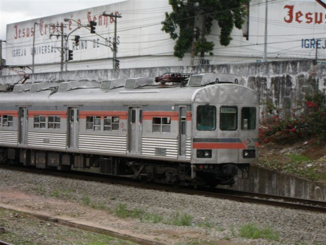 Trem 1600 CPTM - Reformado